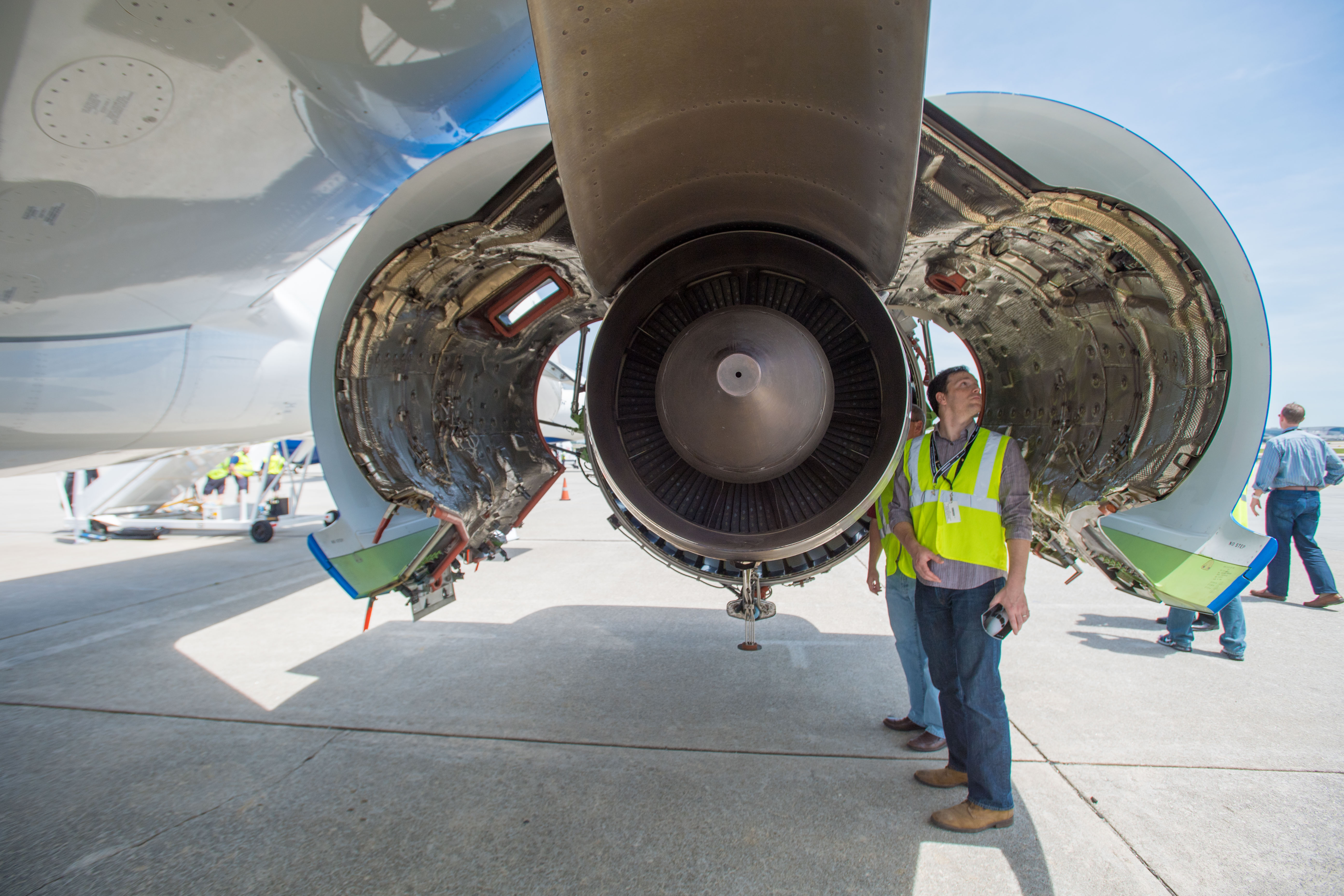 Bombardier CS100